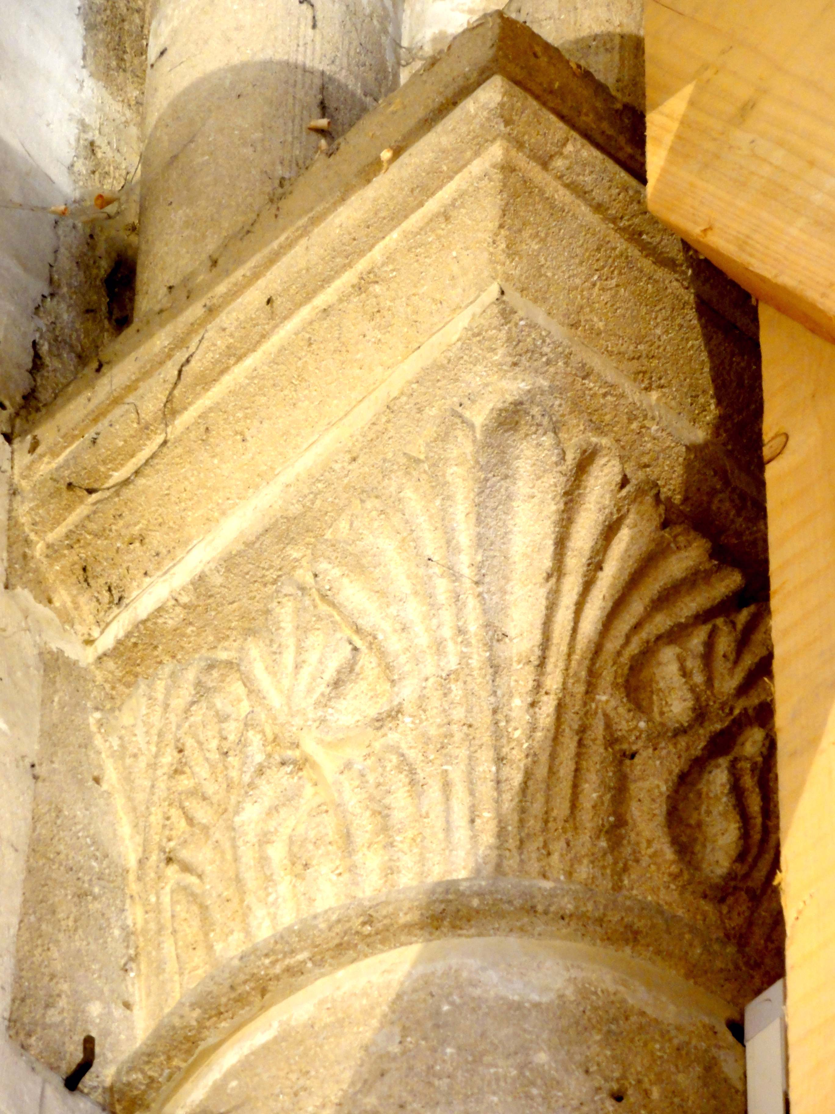 Chapiteau(x) de l'église - voir titre.